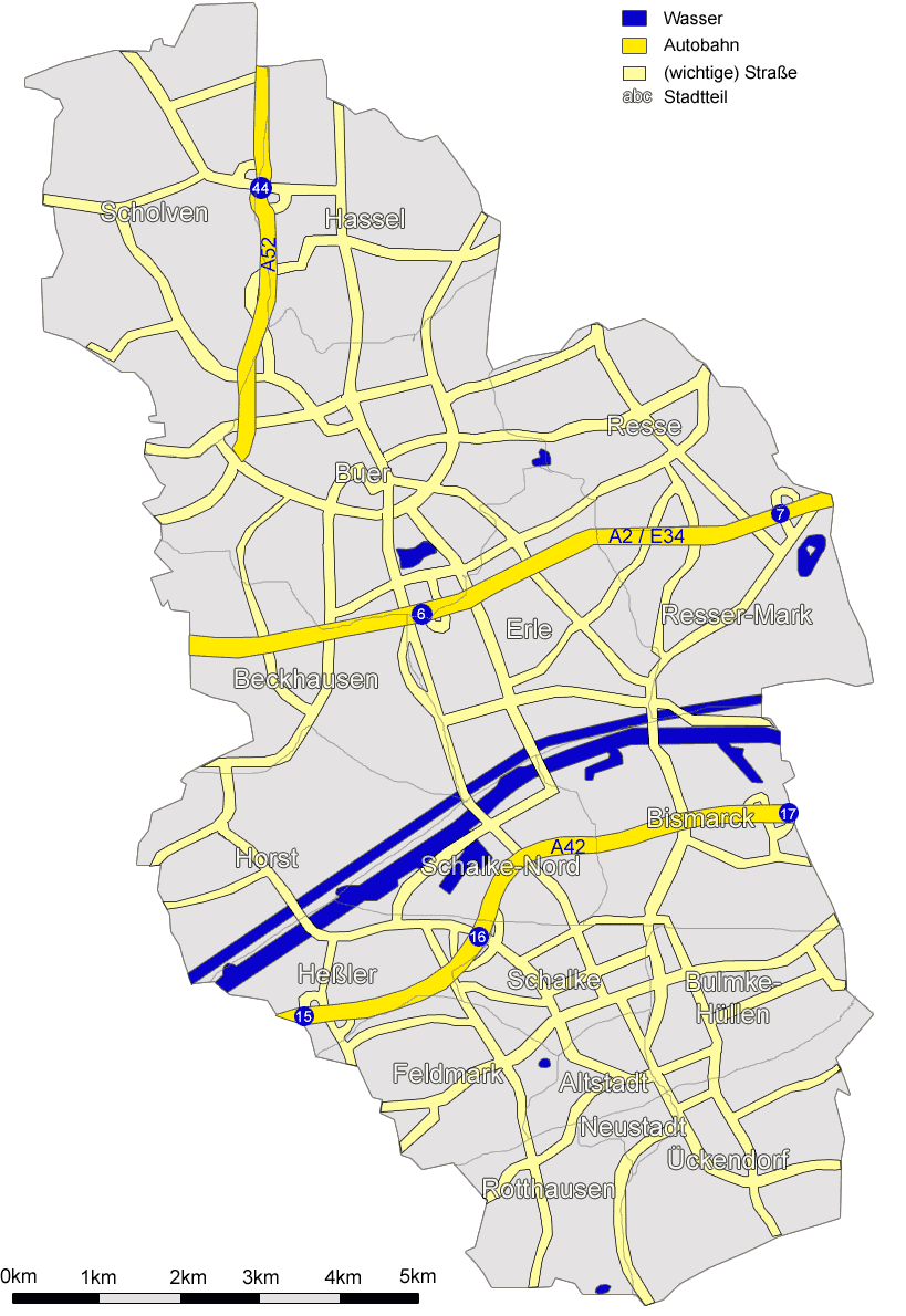 Beschreibung: Selbst erstelle Karte von Gelsenkirchen mit Straßen und Stadtteilen. Description: Self-provided map of Gelsenkirchen with its streets and quarters. Quelle/Source: Selbst erstellt / Self-provided Autor/Author: Marc Schuelper